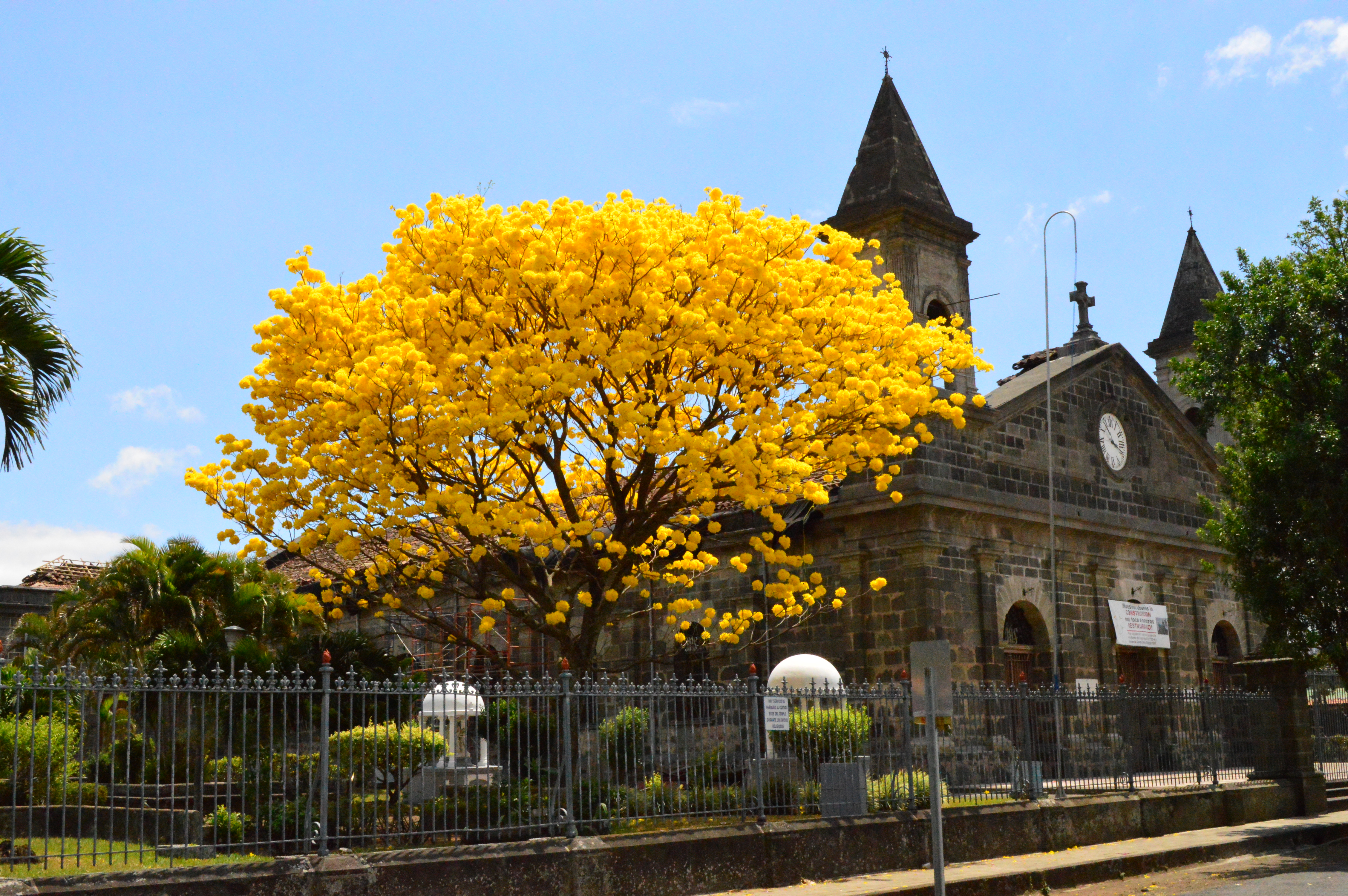 Templo parroquial de San Joaquín de Flores, Heredia